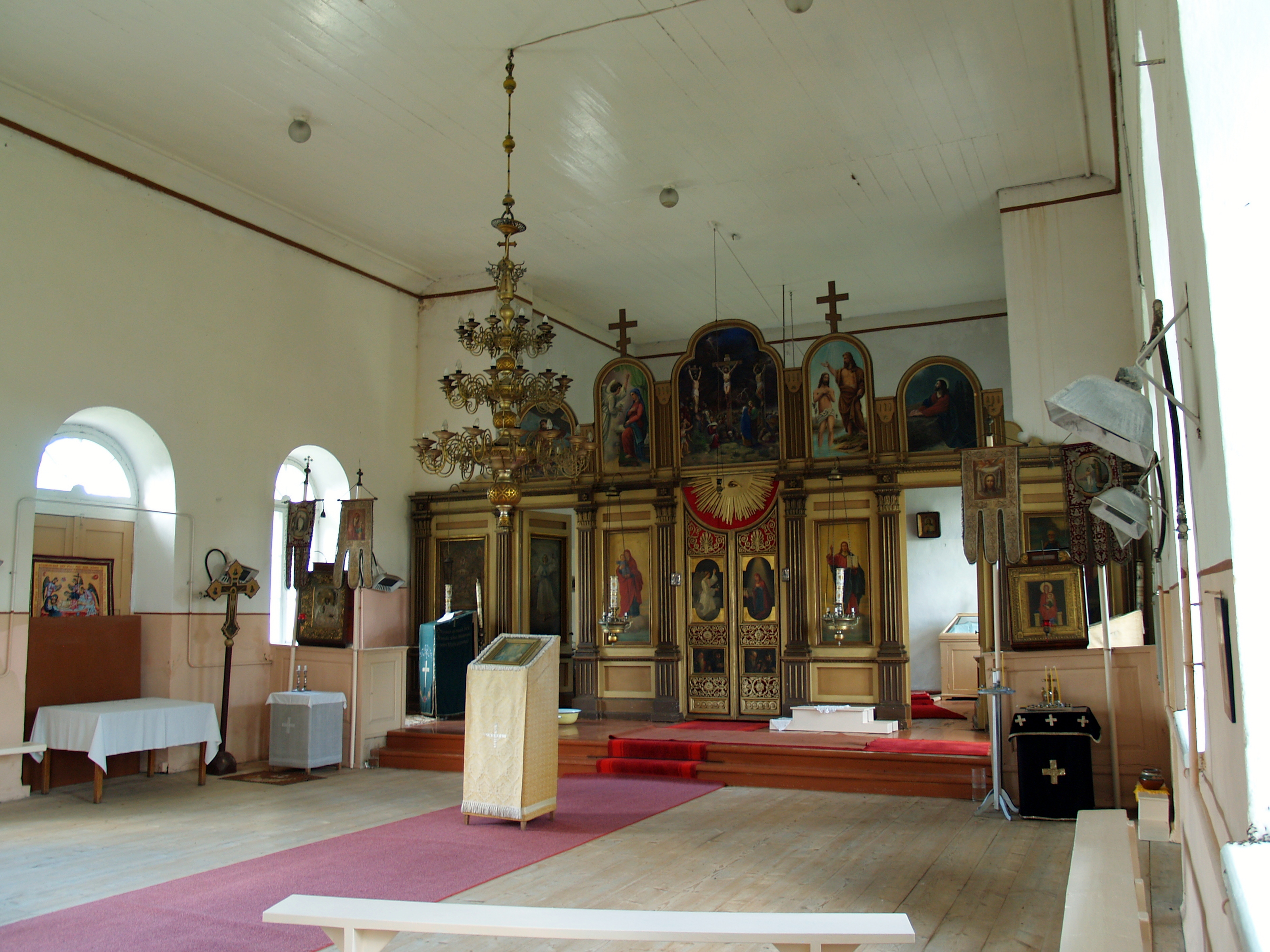 Hellamaa õigeusu kirik